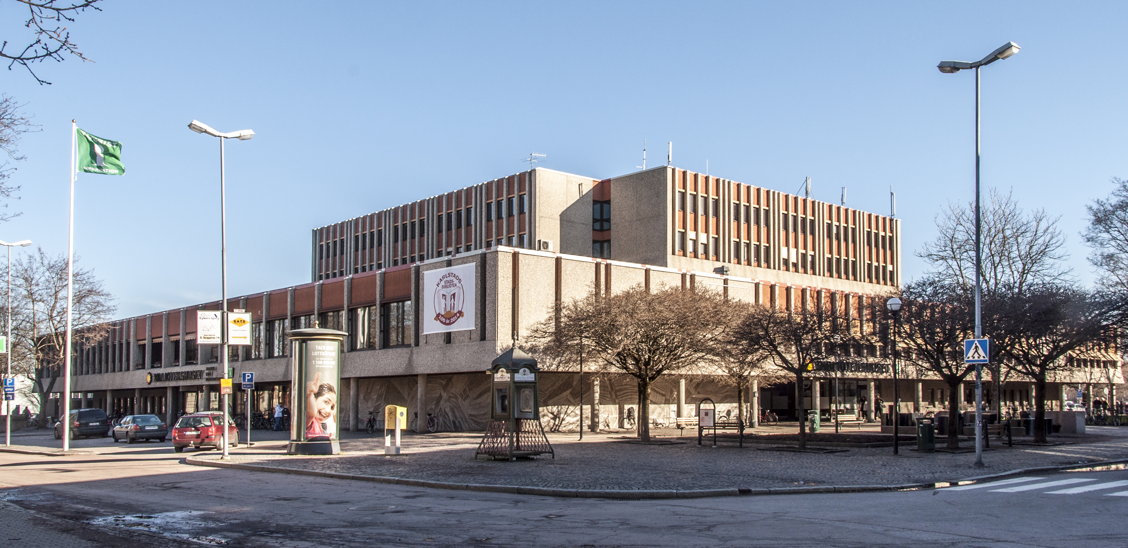 Stadsbiblioteket i Karlstad, Byggår 1973, Arkitekt Janne Feldt